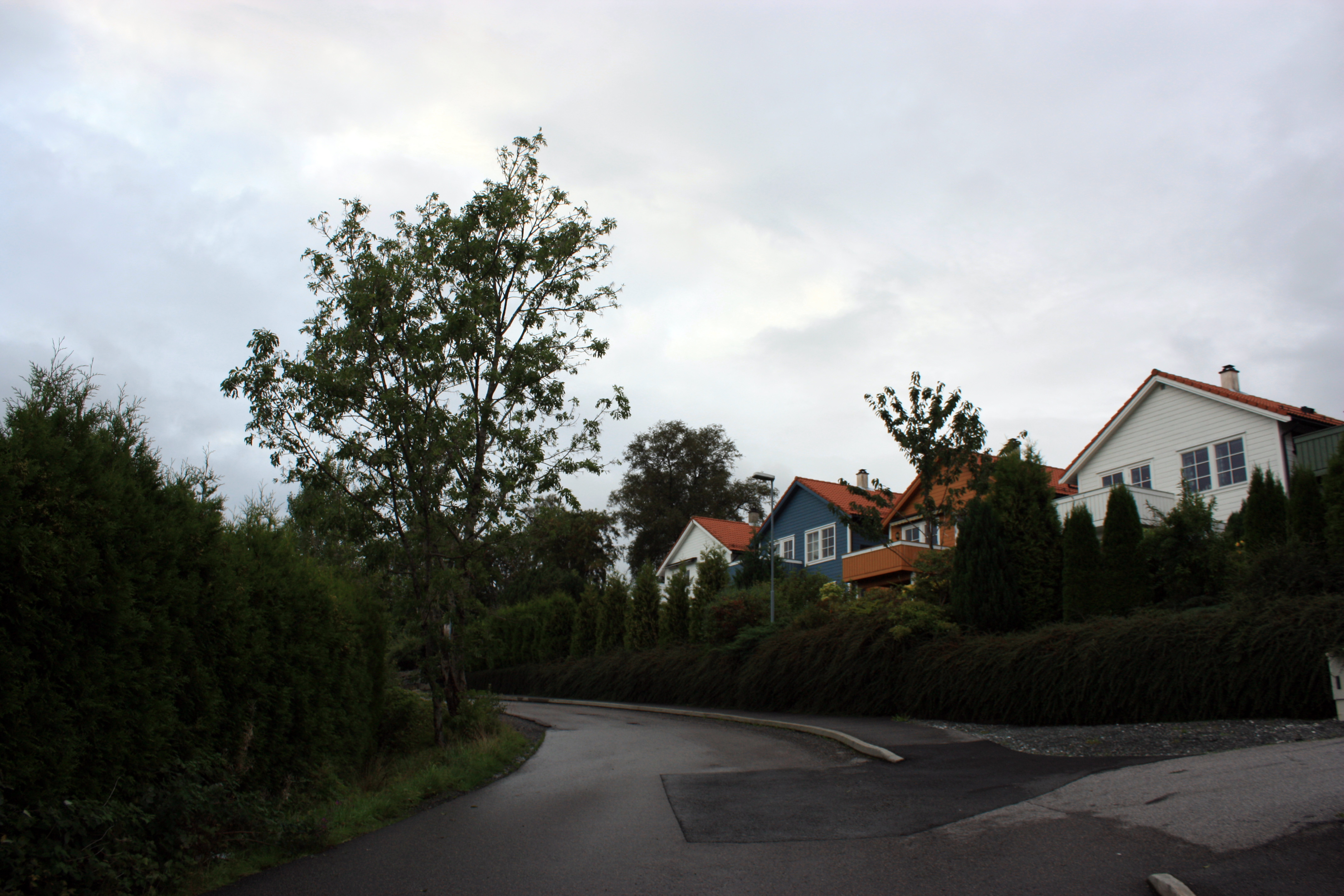 Steinerskolen på Skjold, Fana, Bergen.